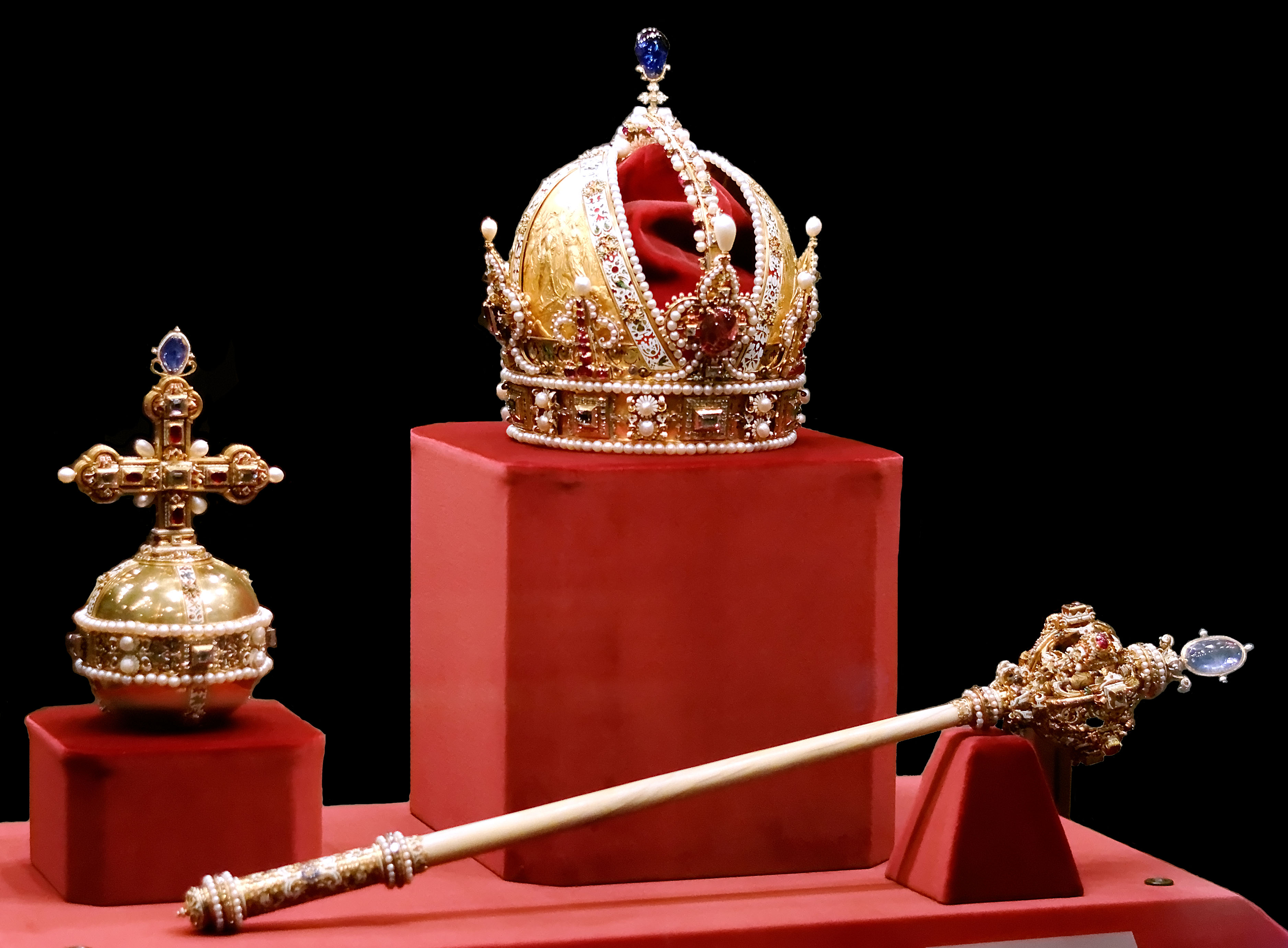 Couronne impériale d'Autriche, sceptre et orbe. Conservée au trésor impérial de Vienne (Autriche).